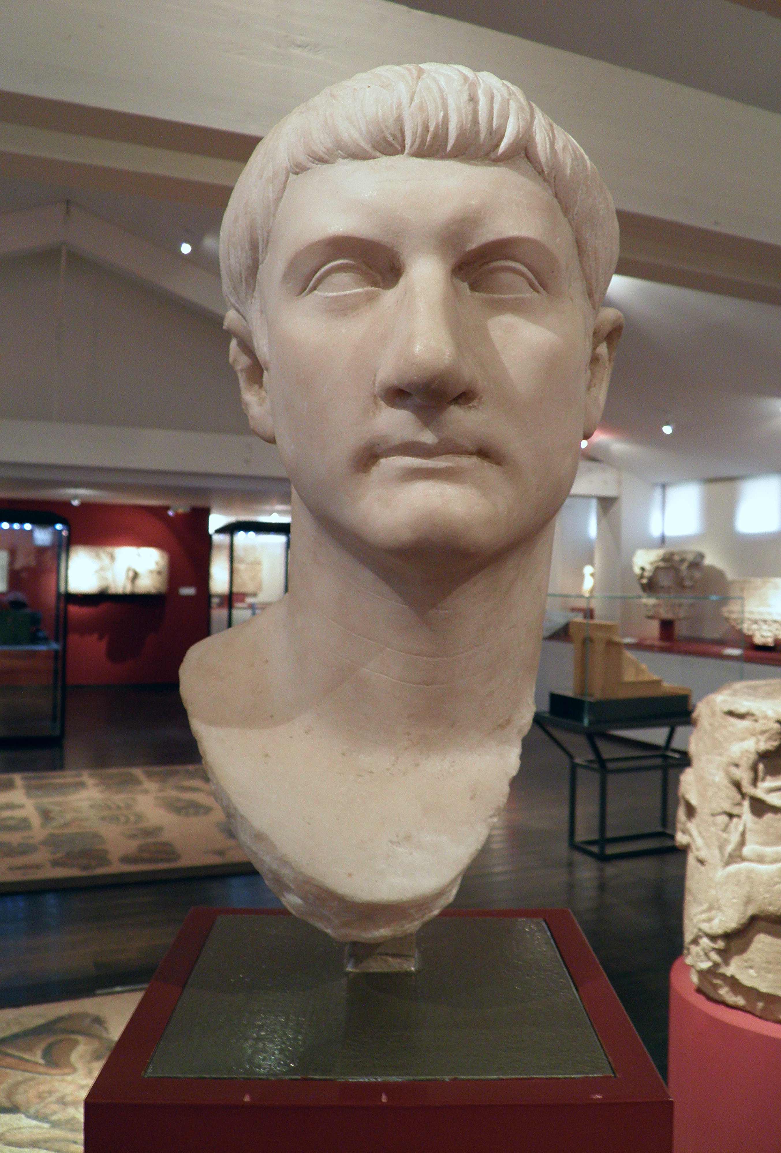 Tête de Drusus le Jeune (Drusus the Younger), fils de Tibère et de Vispania Agrippina, retrouvée à Béziers, MSR, Musée Saint-Raymond